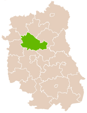 Map of Lubartów county, Lublin voivodship Mapa powiatu lubartowskiego, województwo lubelskie